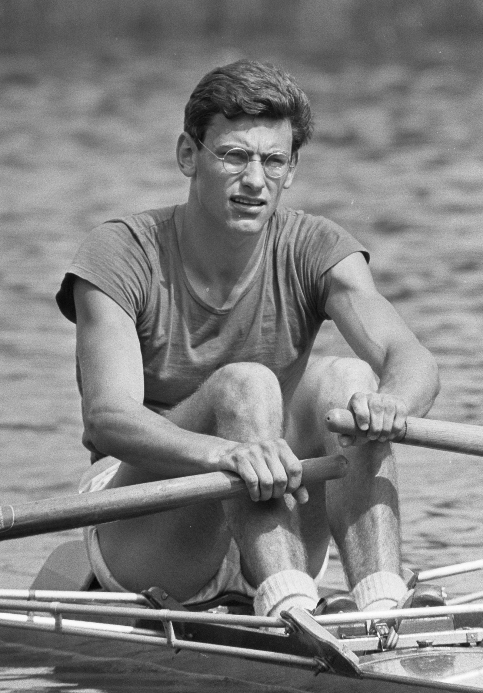 Roeien Bosbaan. Secher (Denemarken), skif